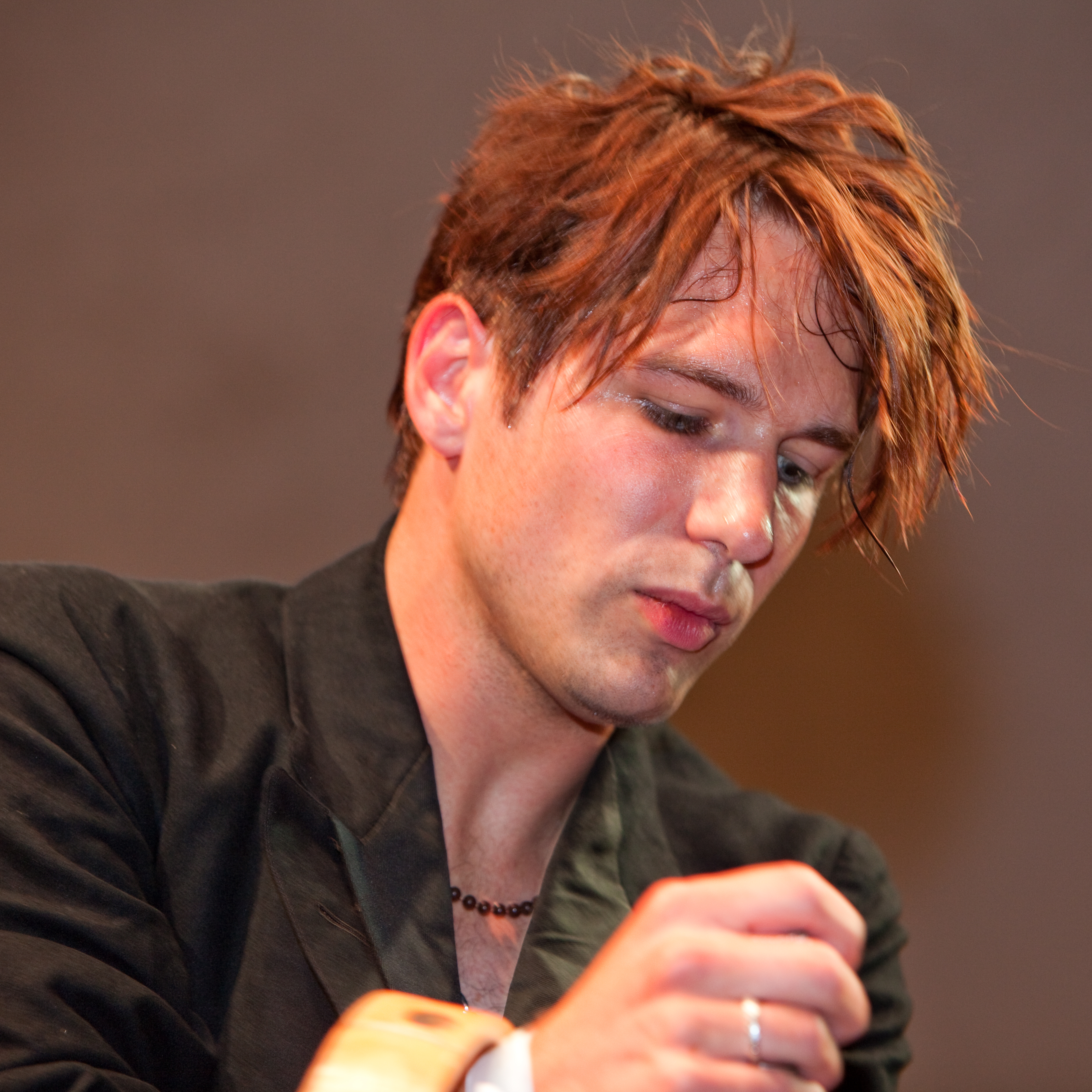 Ola Joyce in Stockholm 2010